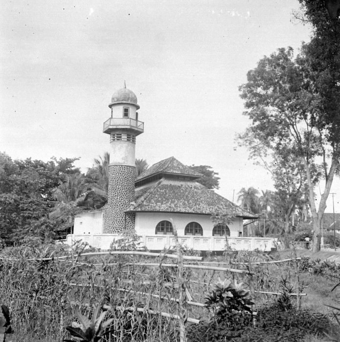 Negatief. Moskee in Batavia